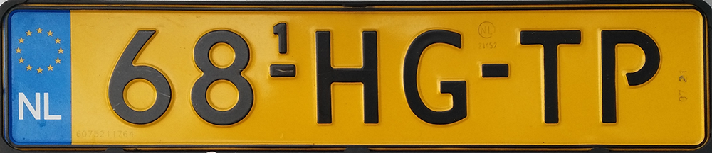 Model de matrícula del període 2013-2015.